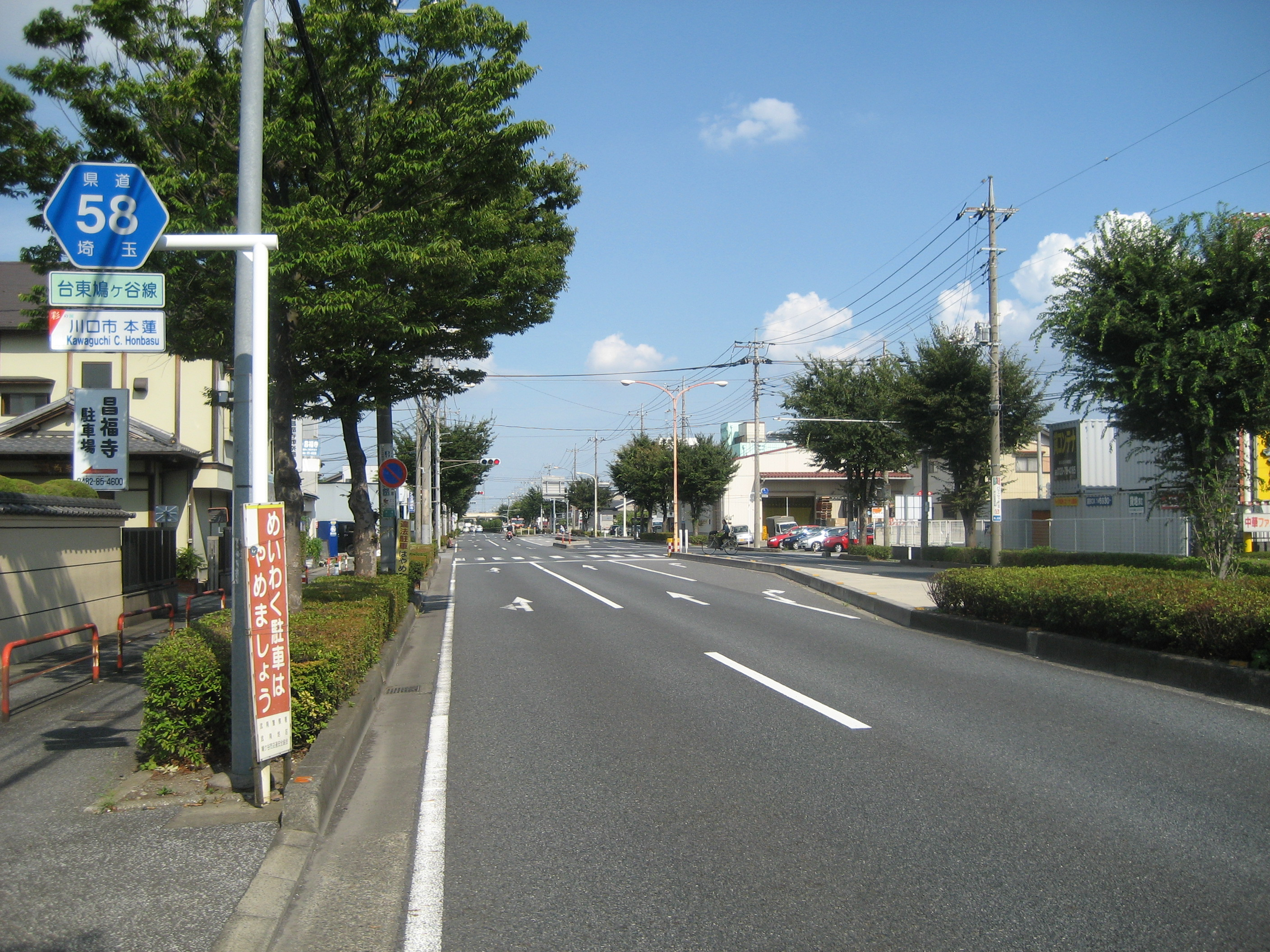 埼玉県道58号線川口市本蓮付近